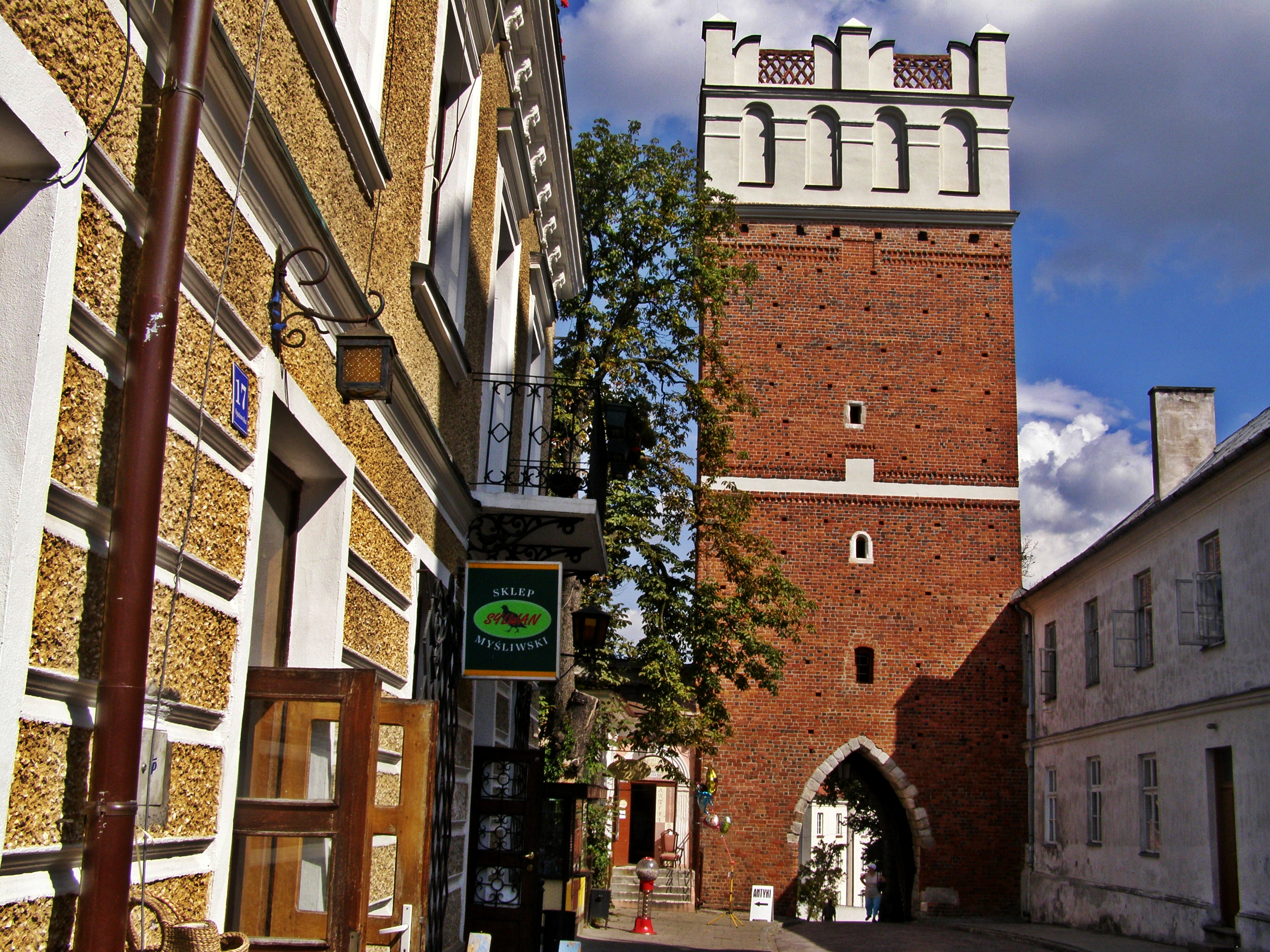 Sandomierz, Brama Opatowska, 2 poł. XIV, XVI w.